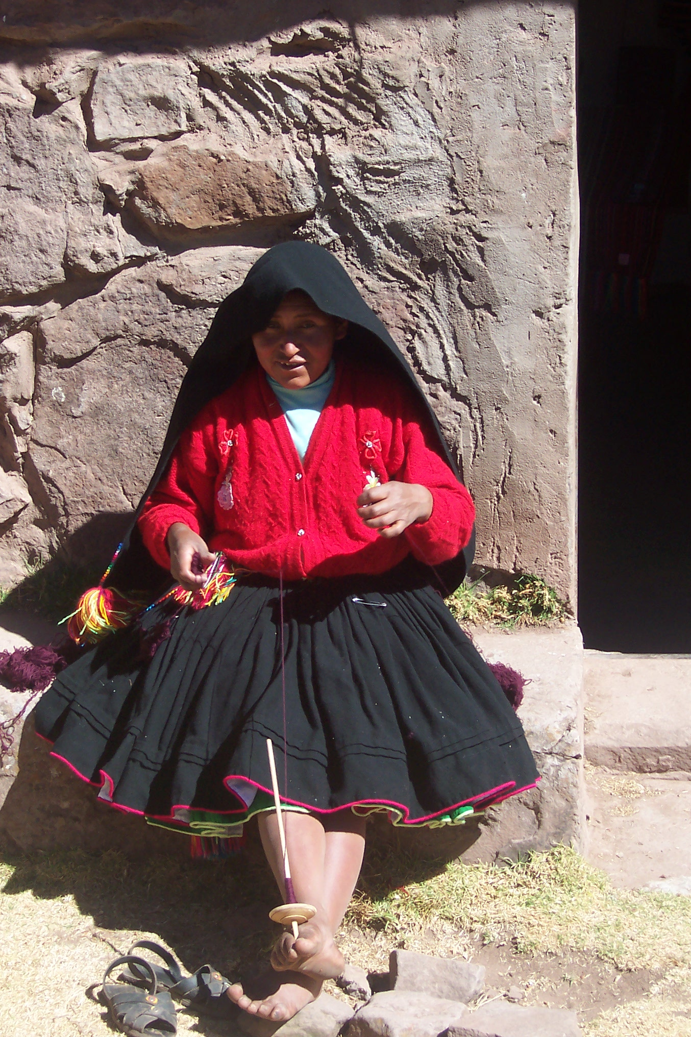 Taquile, Puno, Perú. Mujer hilando Autor: Alfredobi Fecha: Agosto 2006